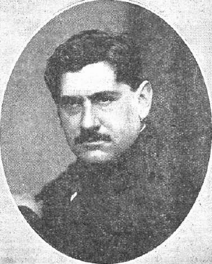 Fotografía del escritor y periodista español Salvador Cánovas Cervantes publicada en 1914